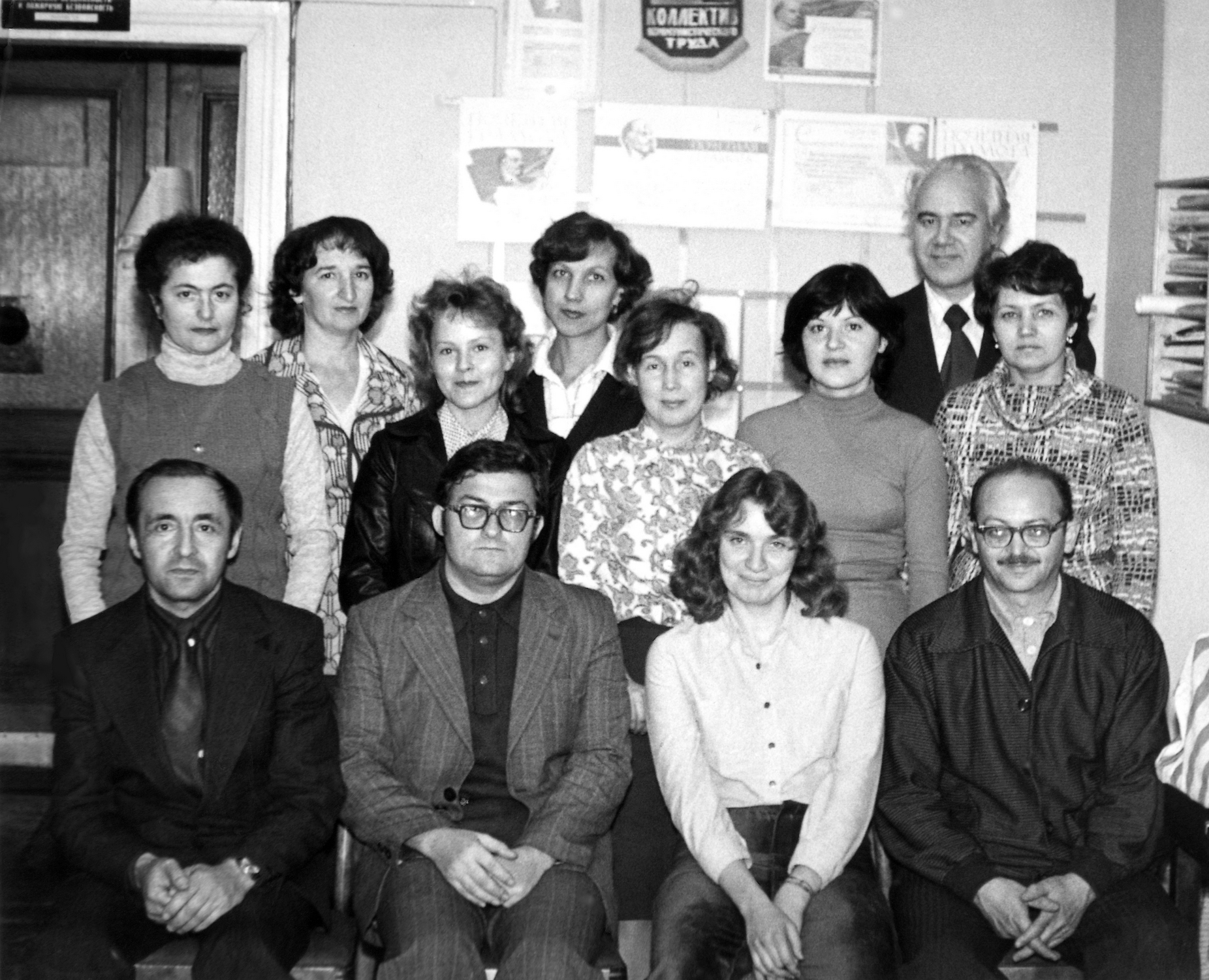 Сотрудники лаборатории очистки сточных вод ВУХИНа. Сидят: крайний слева — И. Б. Евзельман, рядом с ним С. В. Майский, крайний справа — зав. лабораторией В. М. Кагасов; стоят: крайняя слева — Д. Р. Казакевич, 2-я слева — Э. П. Зерницкая, 4-я слева — Л. А. Смирнова, 5-я слева — Л. А. Копытова, 7-й слева — И. В. Пименов. Свердловск, 1980 Выпускники УПИ: И. Б. Евзельман, В. М. Кагасов, Э. П. Зерницкая, Л. А. Копытова, И. В. Пименов Выпускники УрГУ: С. В. Майский, Д. Р. Казакевич